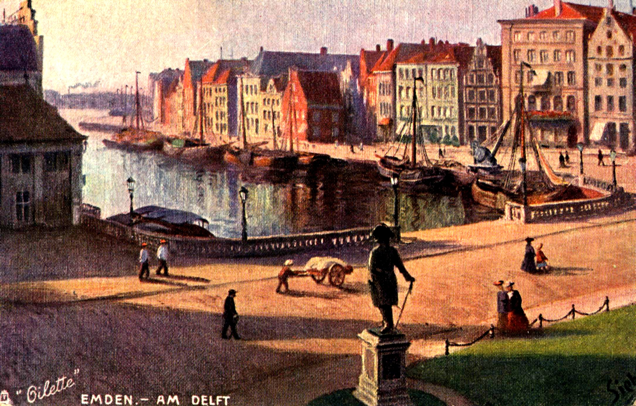 Emden, Am Delft - Am Endpunkte des Dortmund-Emskanals gelegen, ist Emden mit ca 17 000 Einwohnern die Lebhafteste Handelsstadt von Ostfriesland.